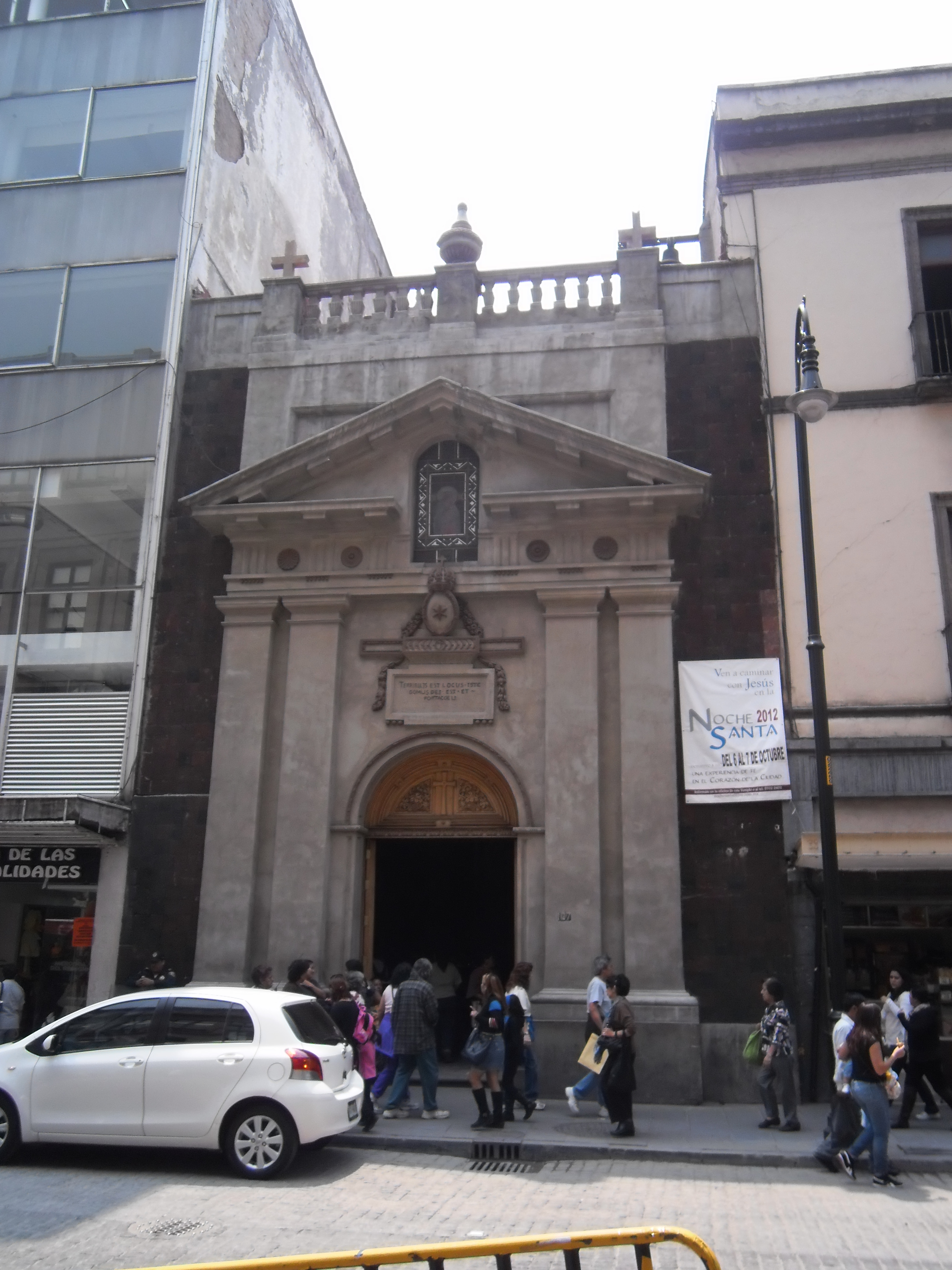 Templo de Porta Coeli